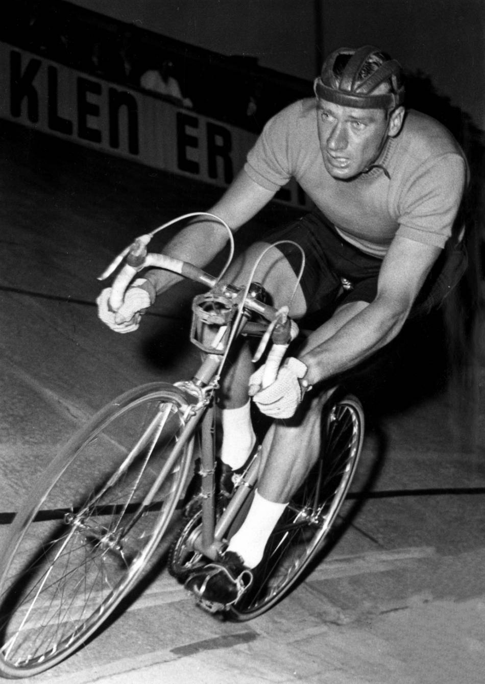 Eluf Dalgaard